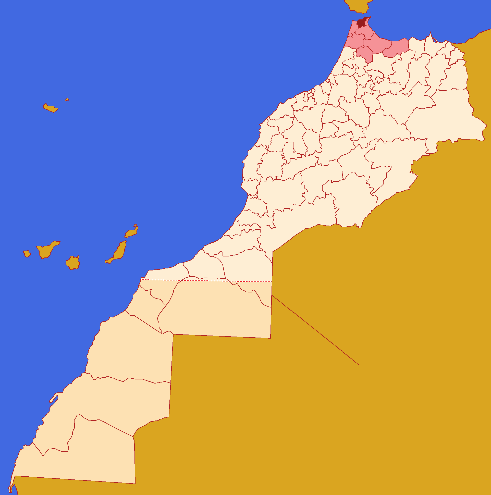 Localização da Provincia de Fahs-Anjra em Marrocos e na Região de Tânger-Tetuão-Al Hoceïm